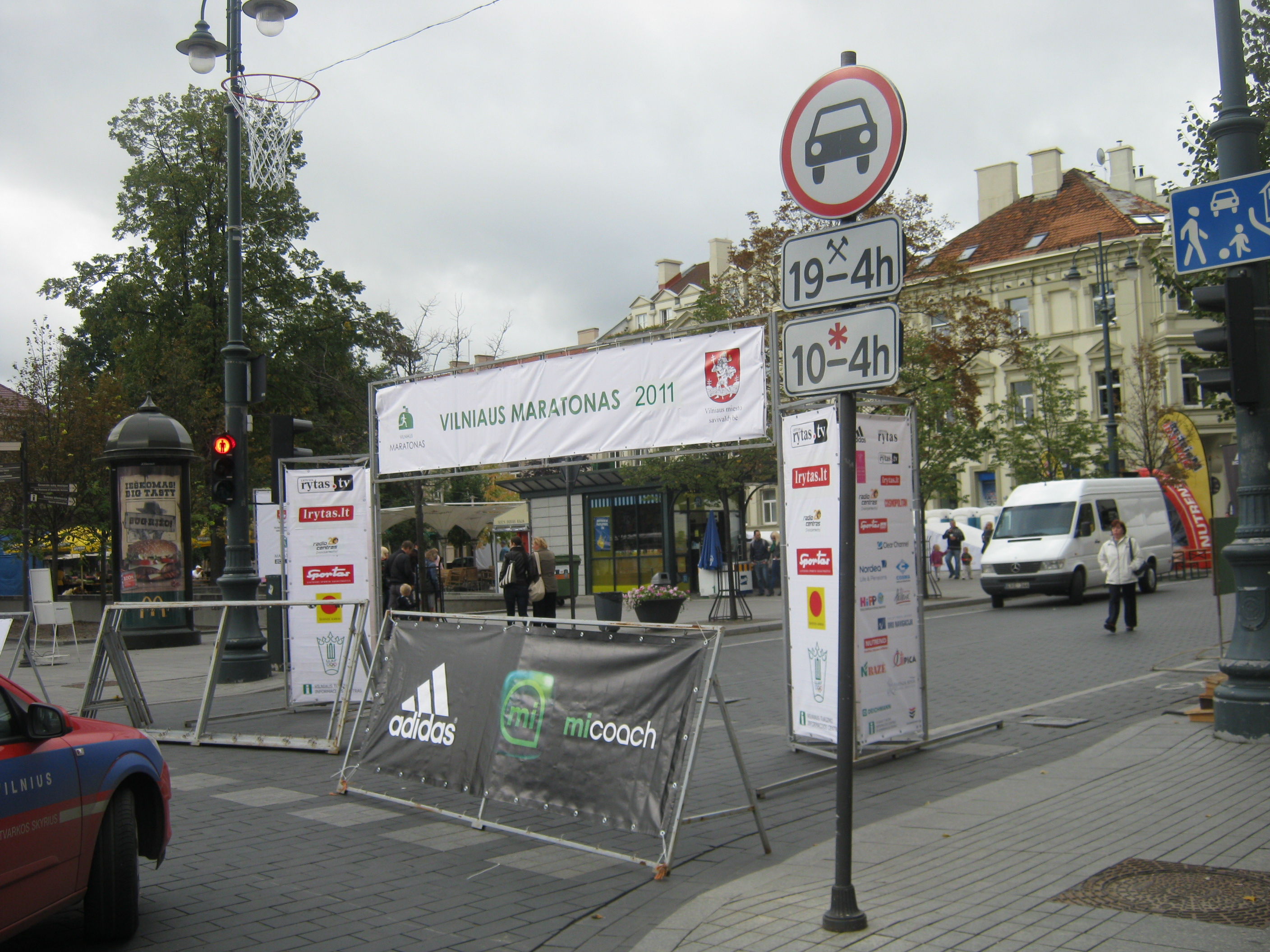 Vilniaus maratonas